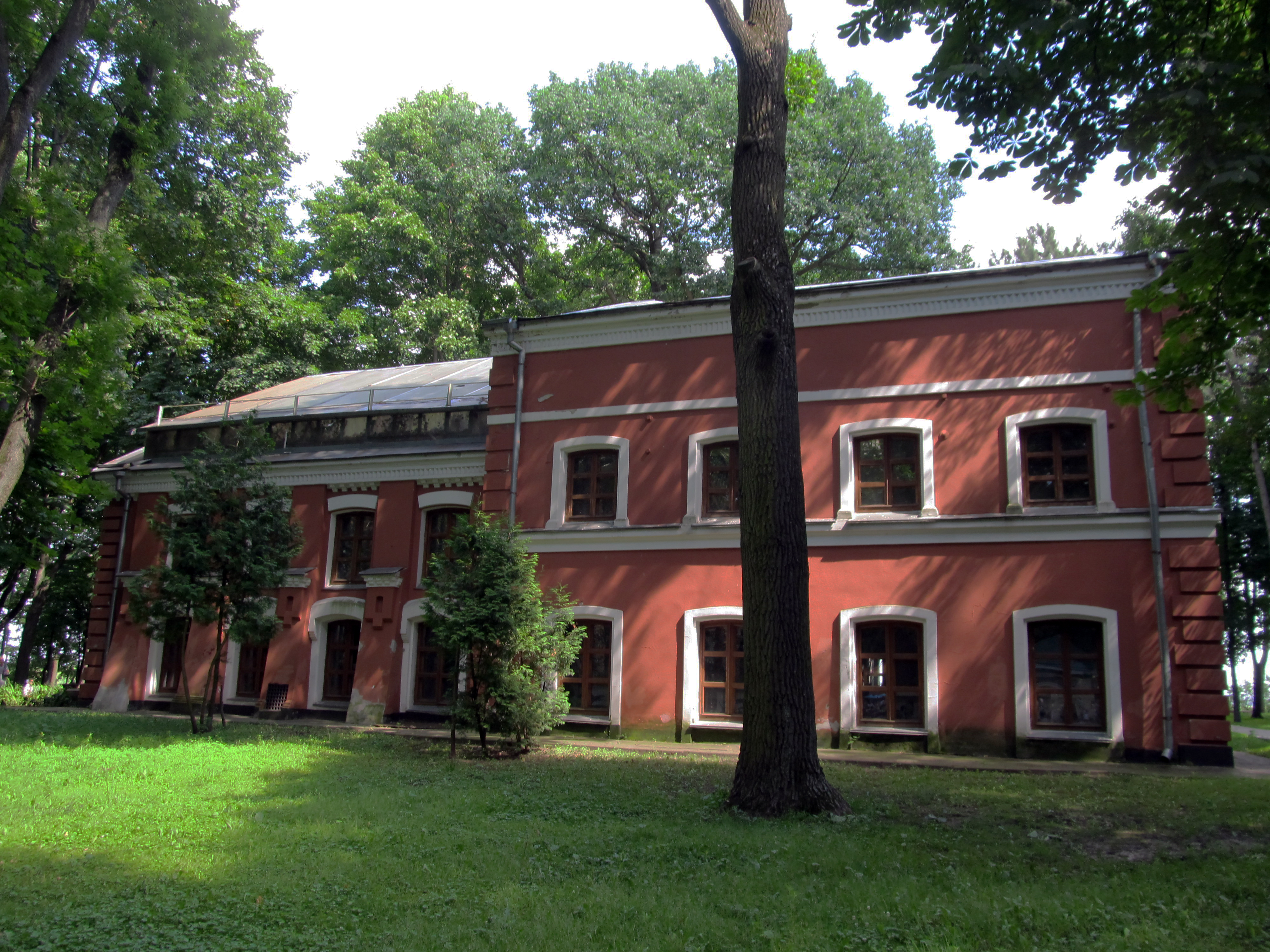 Беларуская (тарашкевіца): Будынак «Зімовы сад» зь вежай. г. Гомель This is a photo of Belarusian heritage monument. Reference number: 312Г000050 ( WLM)